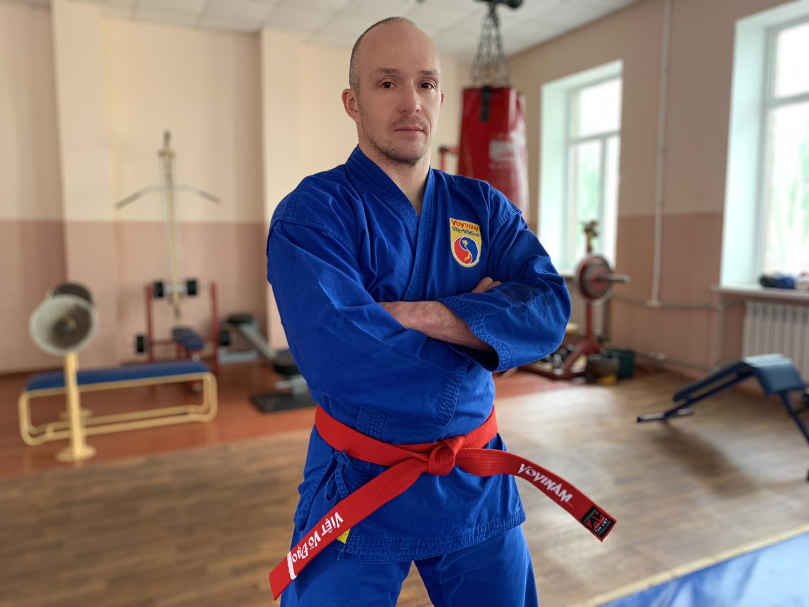 Двукратный чемпион СНГ по Вовинам Вьет Во Дао (Vovinam Viet vo dao) 1993-1994. (Украина); Чемпион Европы по Вовинам - 1997 2 золотые медали в разделах поединки и шонг луен ( парные упражнения). (Франция,Париж); Чемпион Европы по Вовинам 1999. 2 золотые медали и 1 бронзовая в поединках и шонг луен, комплекс с шестом. (Франция. Леон); 1999 г. Чемпион мира по карате фул-контакт. (Армения); 2000 г. Победитель международного турнира по боям без правил. (Латвия); 2000 г. Чемпион Украины по Ушу Саньда; 2000 г. Чемпион Европы по Ушу Саньда. (Нидерланды); 2001 г. Бронзовый призер на чемпионате мира по Ушу Саньда среди профессионалов (Италия); 2001 г. Чемпион Украины по Ушу саньда; 2001 г. Интерконтинентальный чемпион по карате фул-контакт. (Армения); 2002 г. Завоевал серебряную медаль чемпионата мира по Вовинам Вьет Во Дао. (Франция. Париж); 2002 г. Чемпион Украины по Ушу саньда; 2005 г. Чемпион Европы по Вовинам Вьет Во Дао (Бельгия. Брюссель); 2006 г. Чемпион мира по Вовинам Вьет Во Дао (Алжир); 2008 г. Чемпион Европы по Вовинам Вьет Во Дао (Франция, Бордо); 2009 г. Чемпион Мира по Вовинам Вьет Во Дао ( Федерация WVVD) ( Вьетнам, Хошимин); 2010 г. Чемпион Мира по Вовинам Вьет Во Дао (Германия, Дортмунд); 2014 г. Чемпион Мира по Вовинам Вьет Во Дао ( БОРЬБА) (Франция. Париж); 2018 г. Чемпион Мира по Вовинам Вьет Во Дао - 2 золотые медали (поединки,борьба) (Бельгия ,Брюссель)